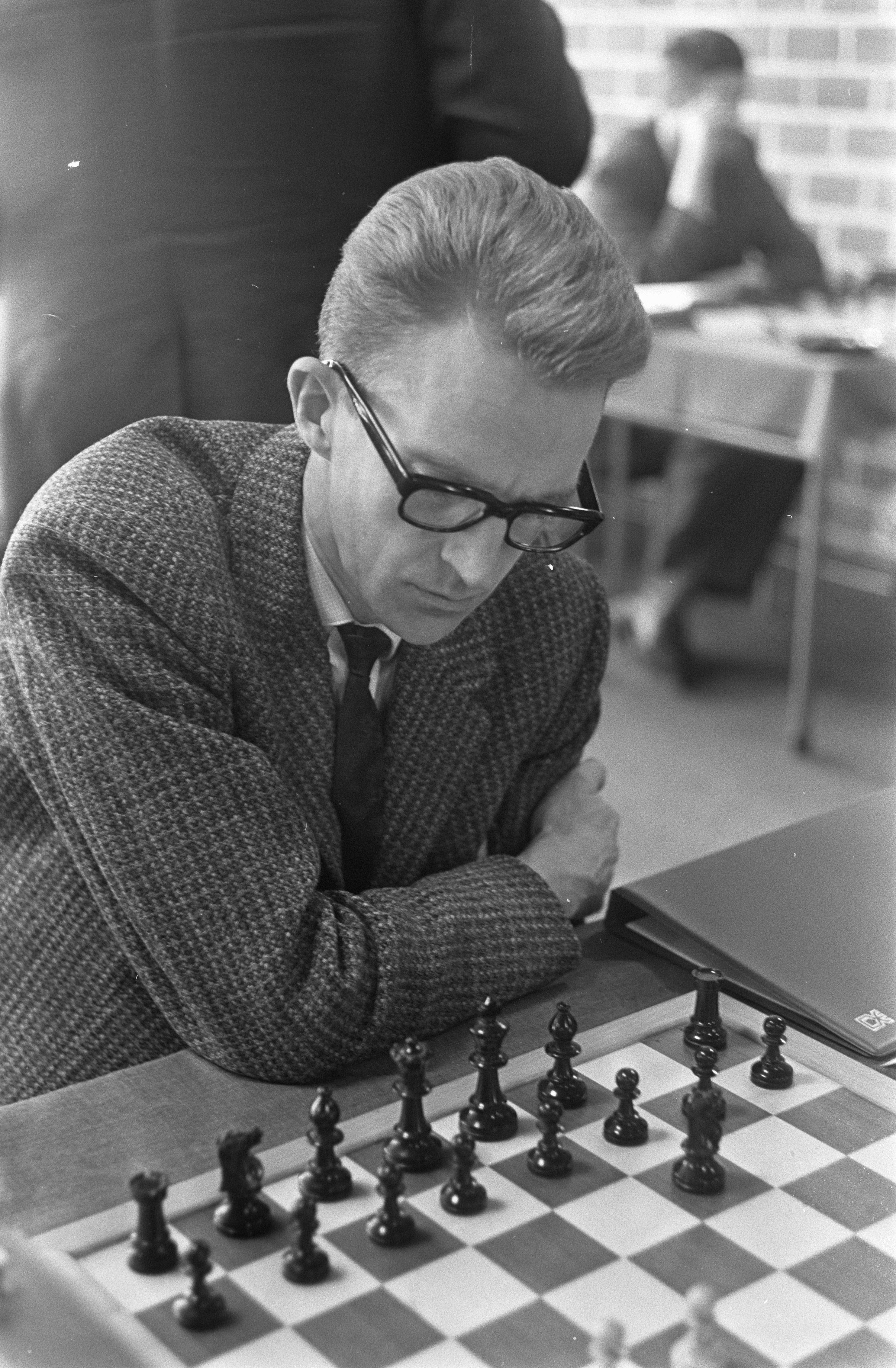 Collectie / Archief : Fotocollectie Anefo Reportage / Serie : [ onbekend ] Beschrijving : Hoogovenschaaktoernooi te Wijk aan Zee nr. 13A : Father Lombardy , nr. 15A : Olafsson Datum : 15 januari 1969 Locatie : Noord-Holland, Wijk aan Zee Trefwoorden : schaken Persoonsnaam : Olafsson, Fridrik Instellingsnaam : Hoogovenschaaktournooi Fotograaf : Koch, Eric / Anefo Auteursrechthebbende : Nationaal Archief Materiaalsoort : Negatief (zwart/wit) Nummer archiefinventaris : bekijk toegang 2.24.01.05 Bestanddeelnummer : 922-0160